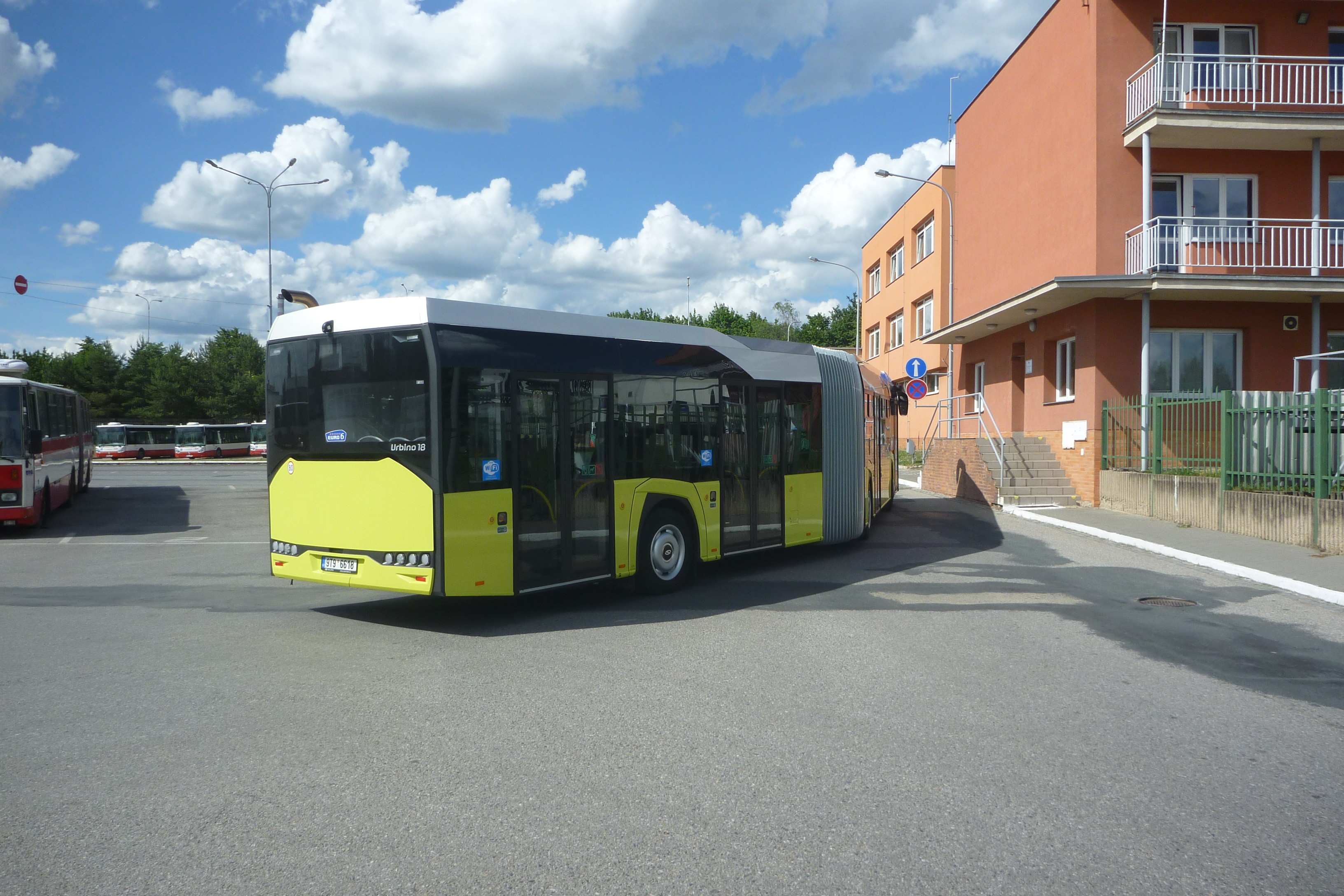 Solaris Urbino 18 IV na zkouškách v Brně